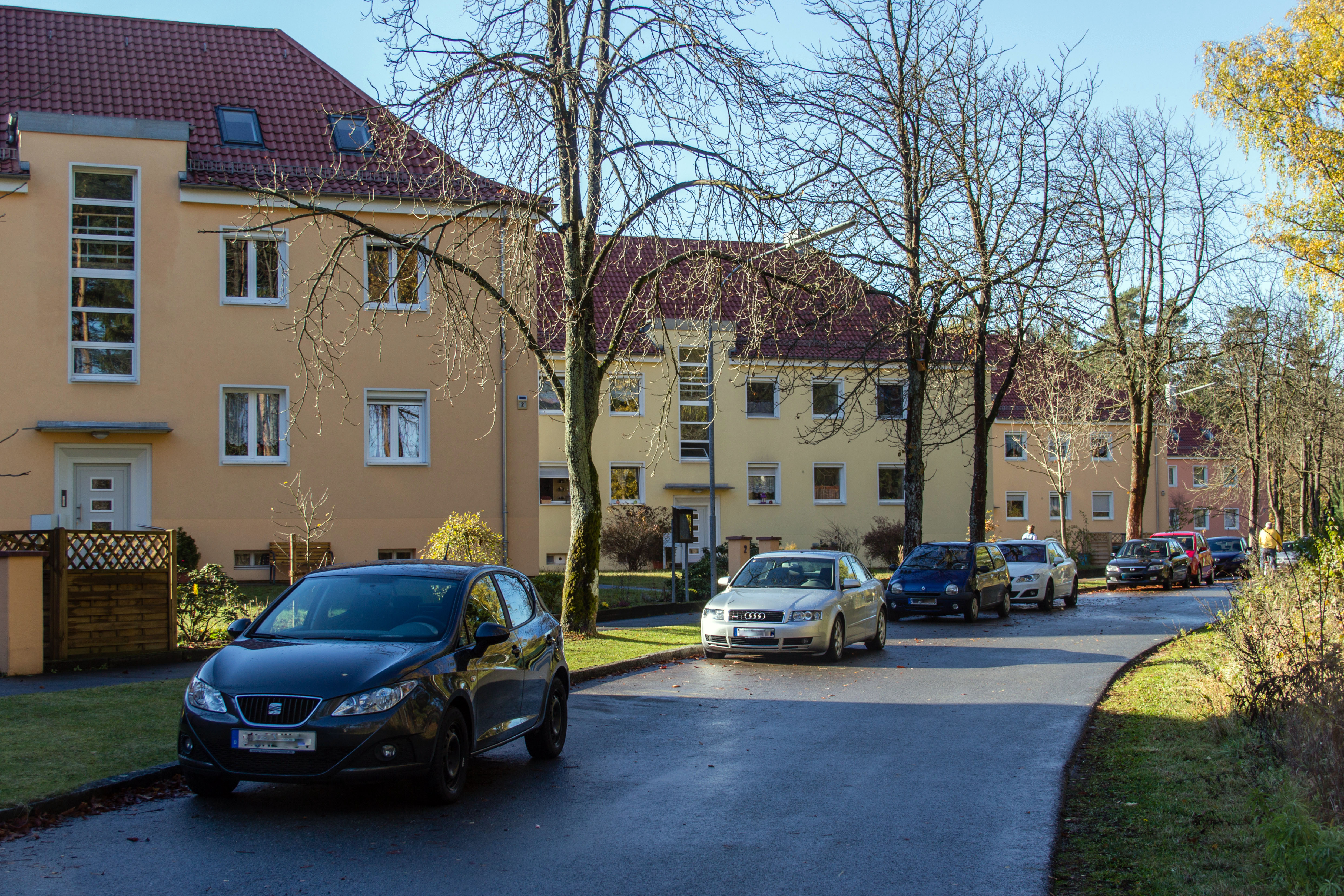 Feucht, Siedlung Äußere Weißenseestraße